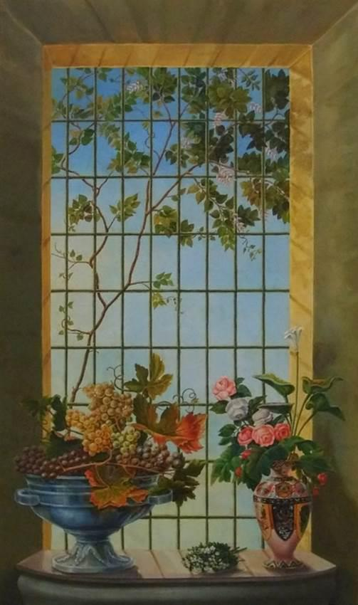 Técnica: Óleo sobre lienzo Sin Fecha Autor: Pascasio González Erazo (1847 - 1916)